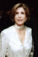 Wallis Annenberg